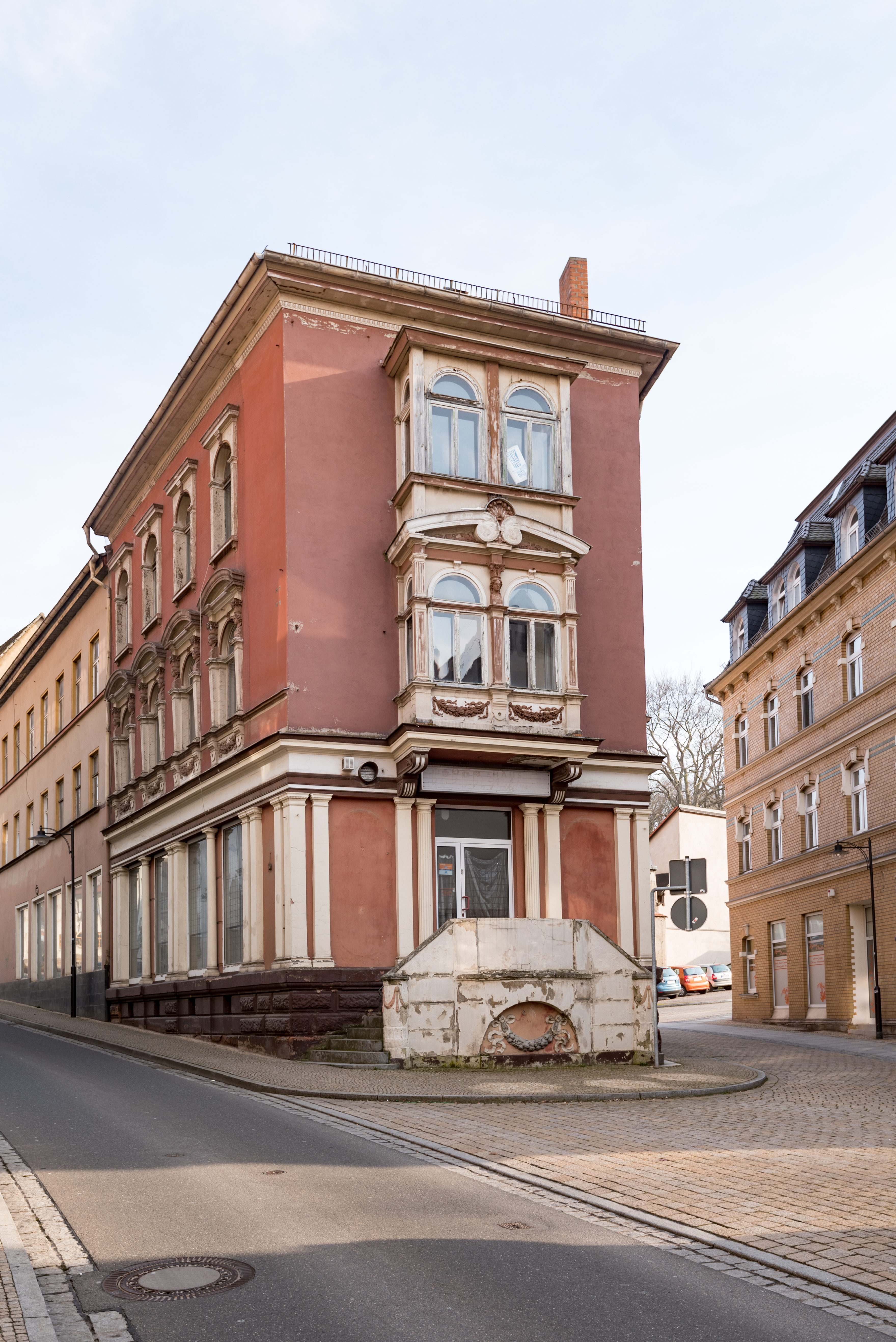 Weißenfels, Große Burgstraße 13